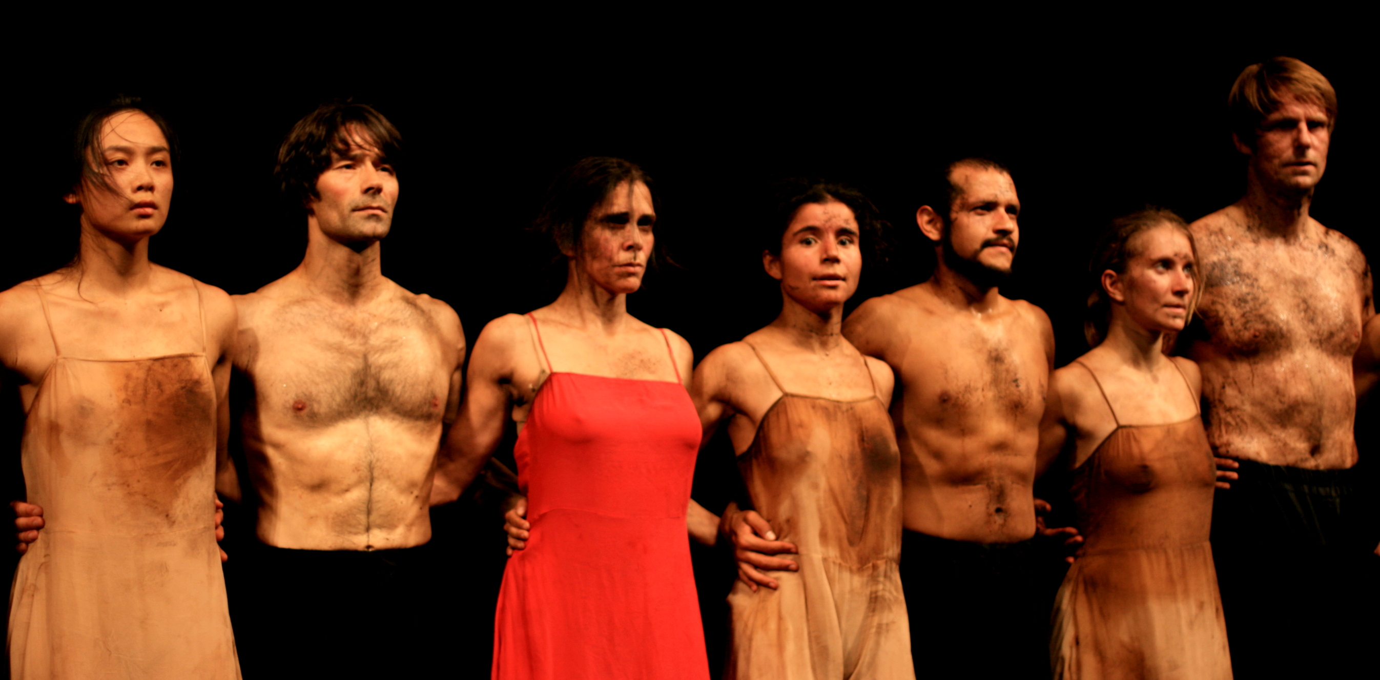 Dance!